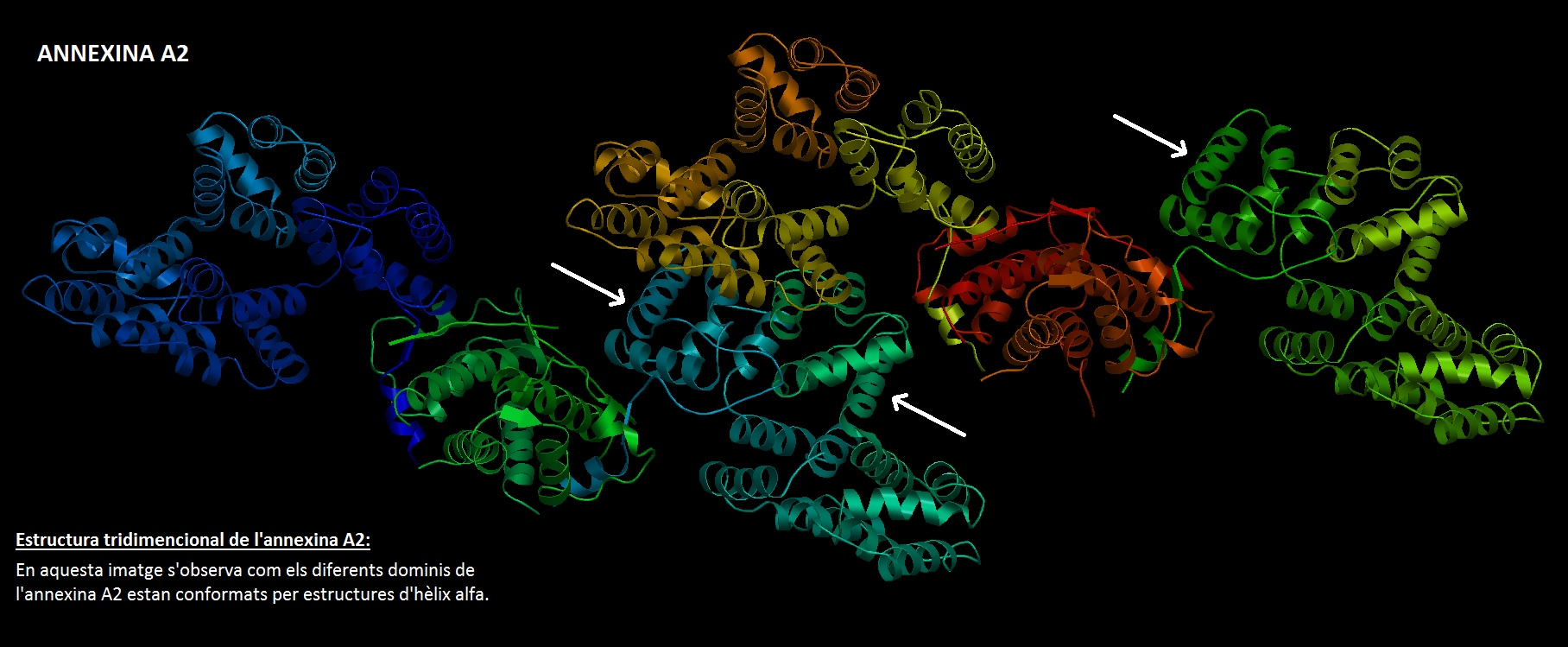 Estructura de l'annexina A2 tridimencional.